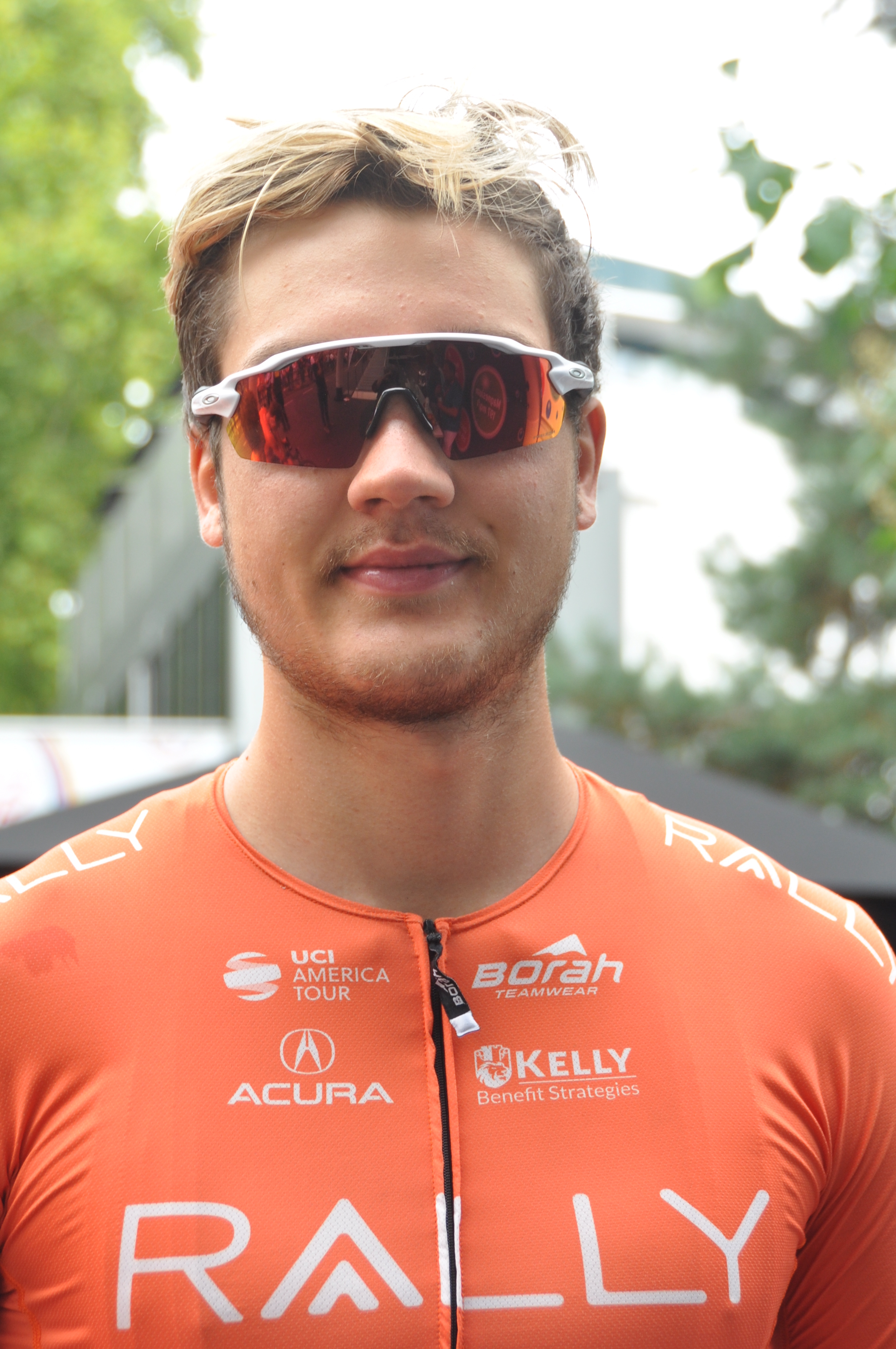 Adam de Vos, kanadischer Radrennfahrer